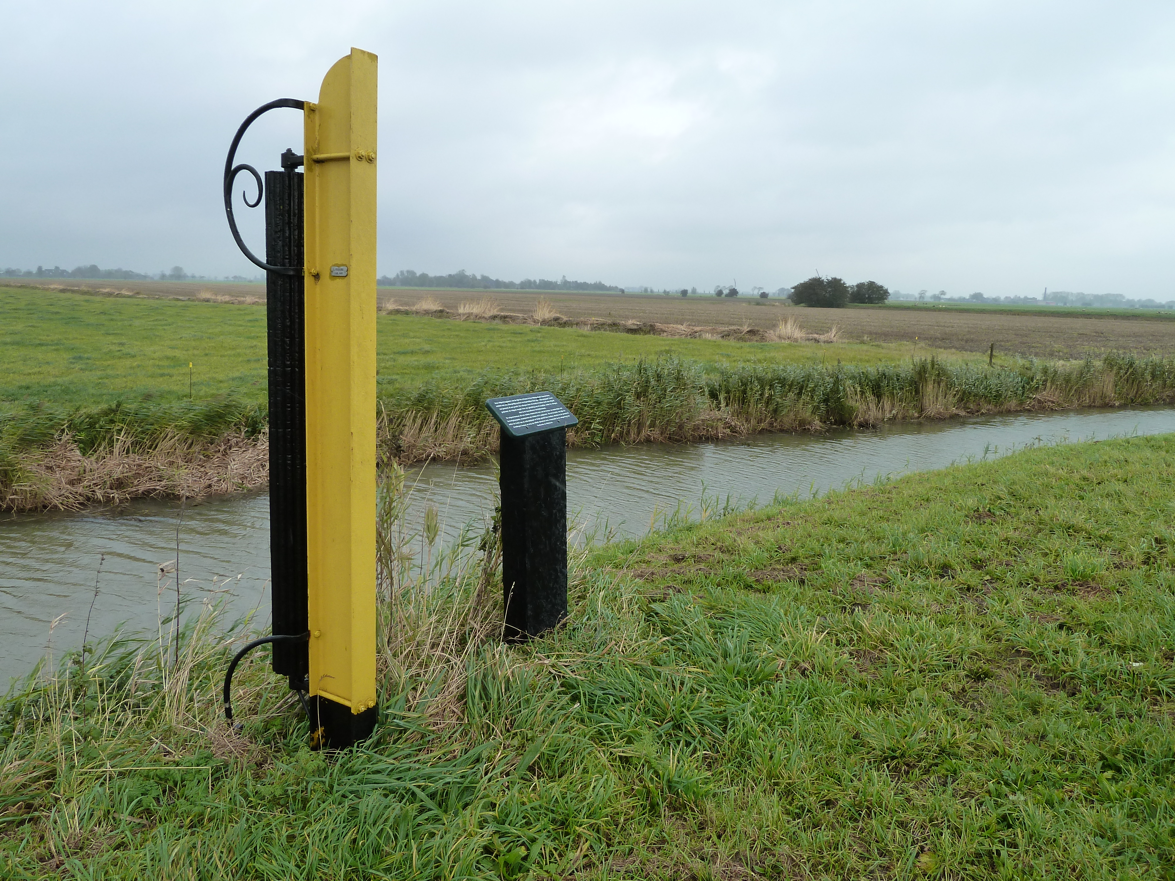 rolpaal| aan het Oldehoofsche Kanaal bij Oldehove (Groningen, Nederland). De tekst op het bordje erbij stelt dat rolpalen alleen nog in de provincie Groningen voorkomen, hetgeen niet juist is, daar ze ook in andere provincies nog staan, alsook in België.